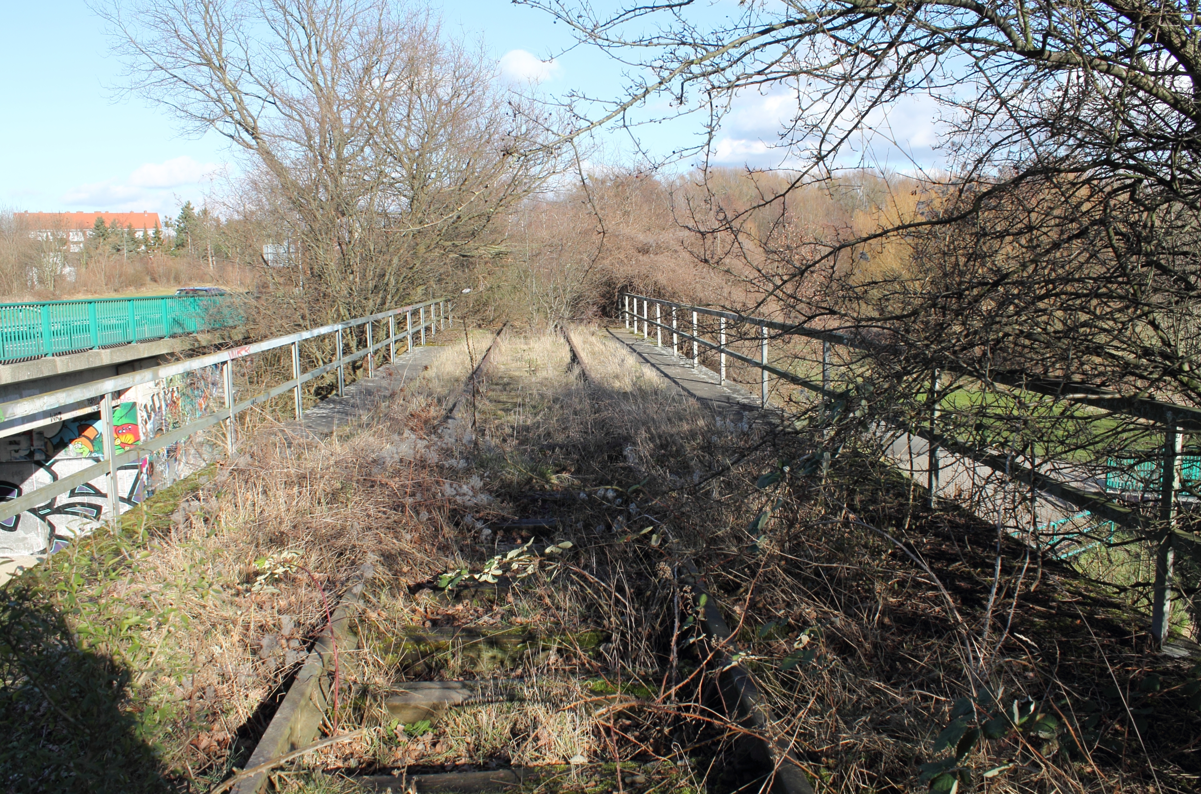 Brücke der Bahnstrecke Braunschweig–Derneburg über die Fuhse, zwischen km 30,3 und 32,8.